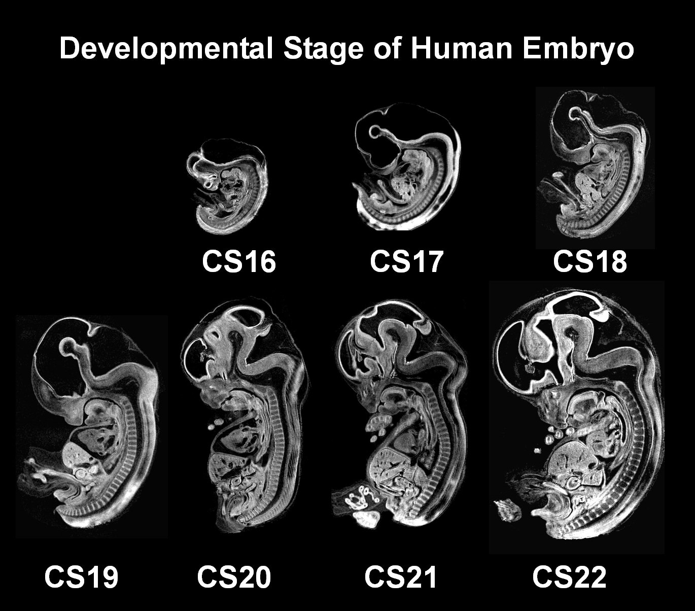 400MHzで撮像した化学固定されたヒト胚子標本のMR microscopy画像